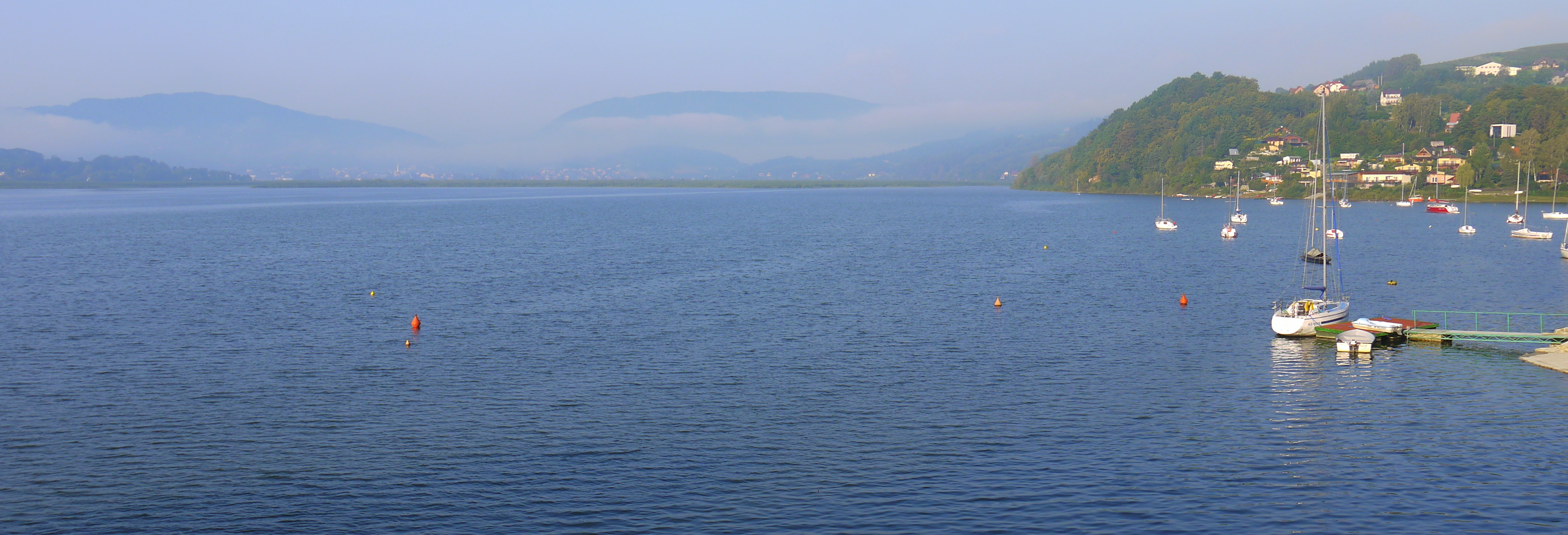 Jezioro Rożnowskie